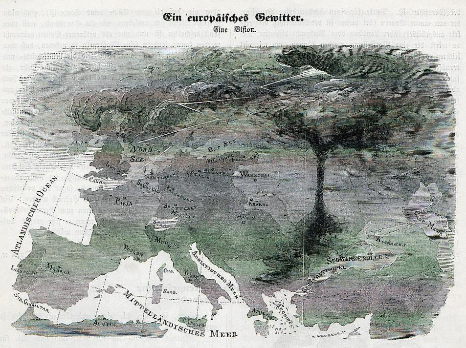 Münchner 'Leuchtkugeln', 1848. Gewitter über Europa.